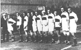 Plantel del Sampierdarenese 1920 frente a la inaguración de su nuevo estadio con la presencia de los hermanos Carzino.